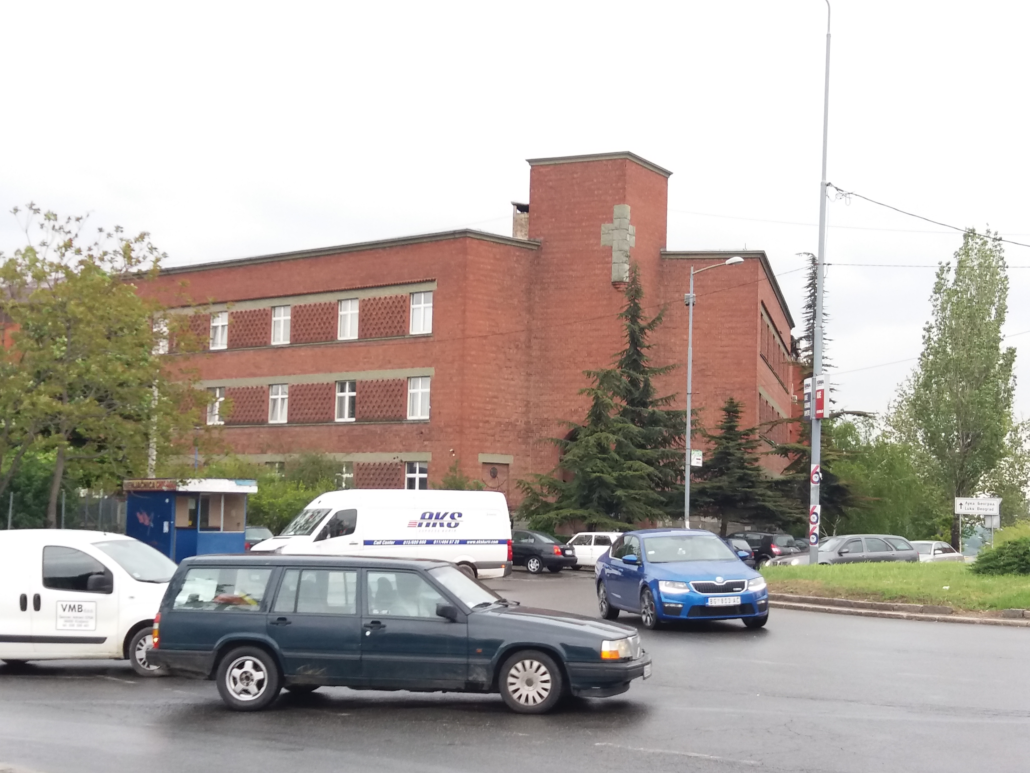 Srpski (latinica): Pravoslavni bogoslovski fakultet, Beograd